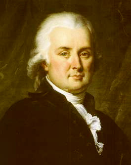 Louis Bénigne François Berthier de Sauvigny (1737-1789)